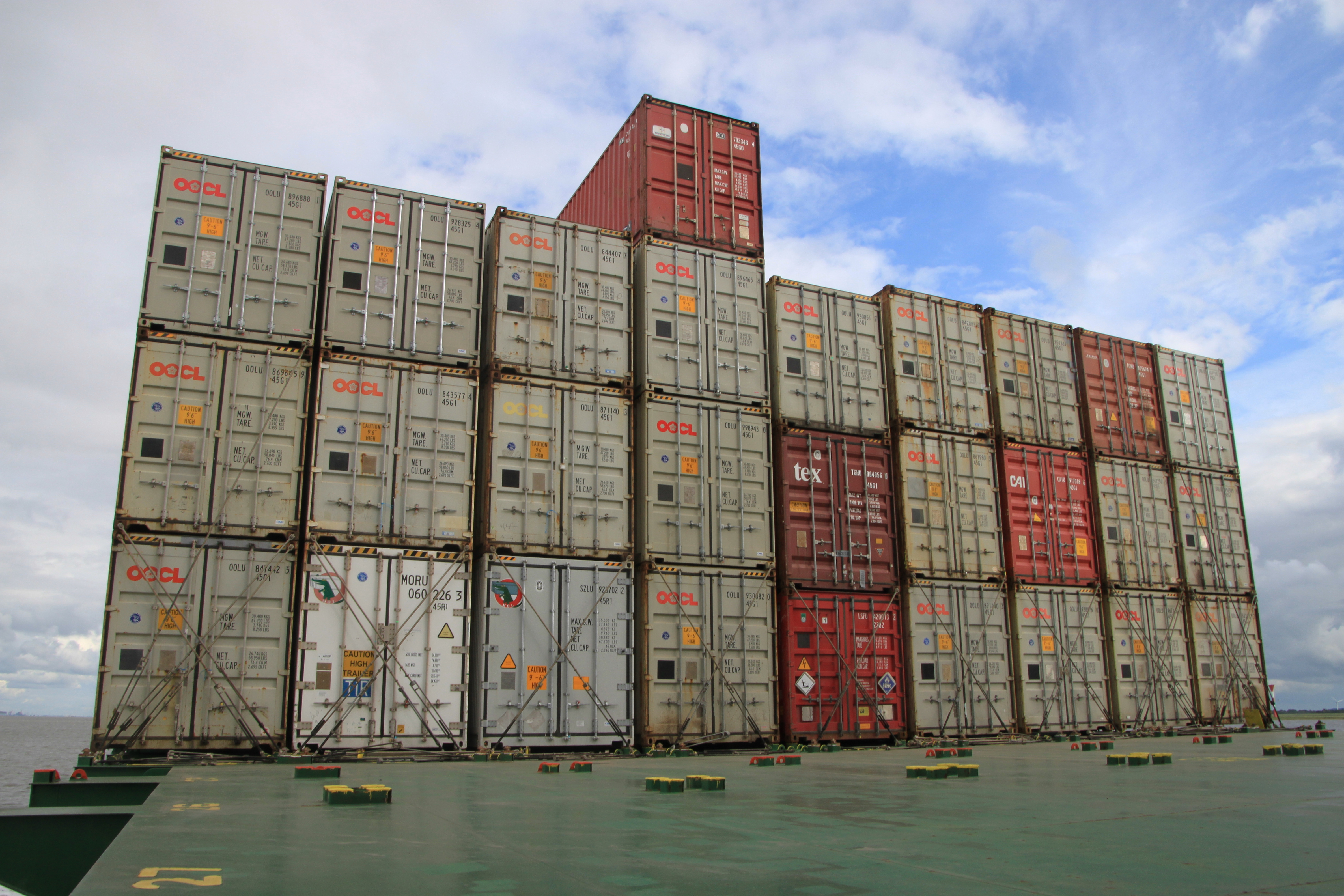 Container an Deck der HEINRICH SCHEPERS